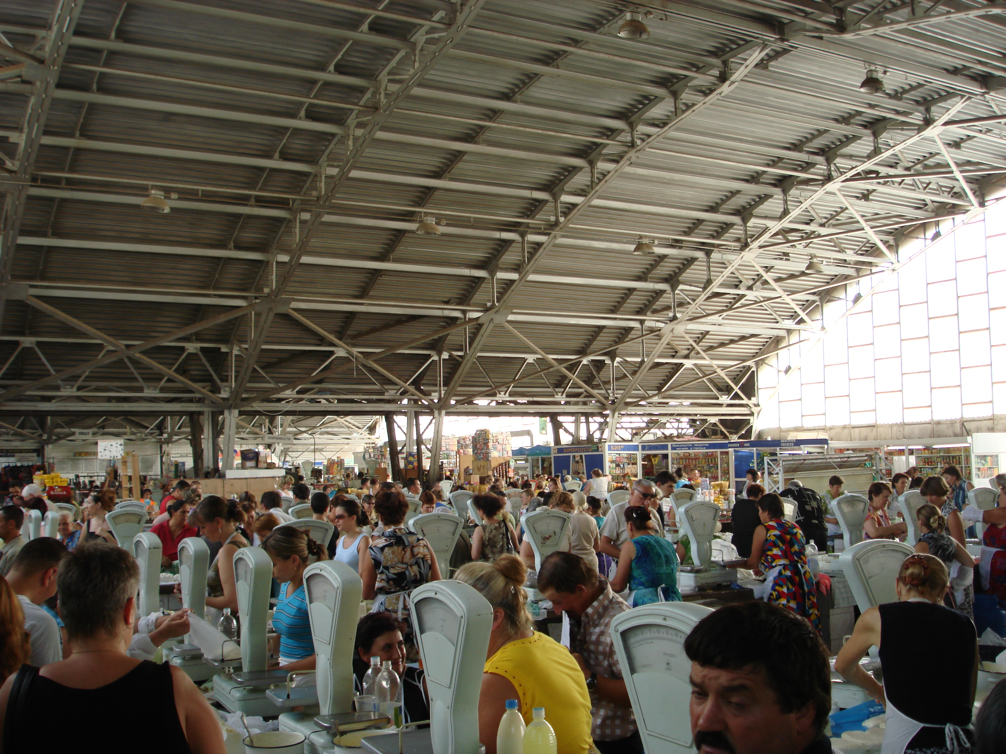 Базар в Бендерах